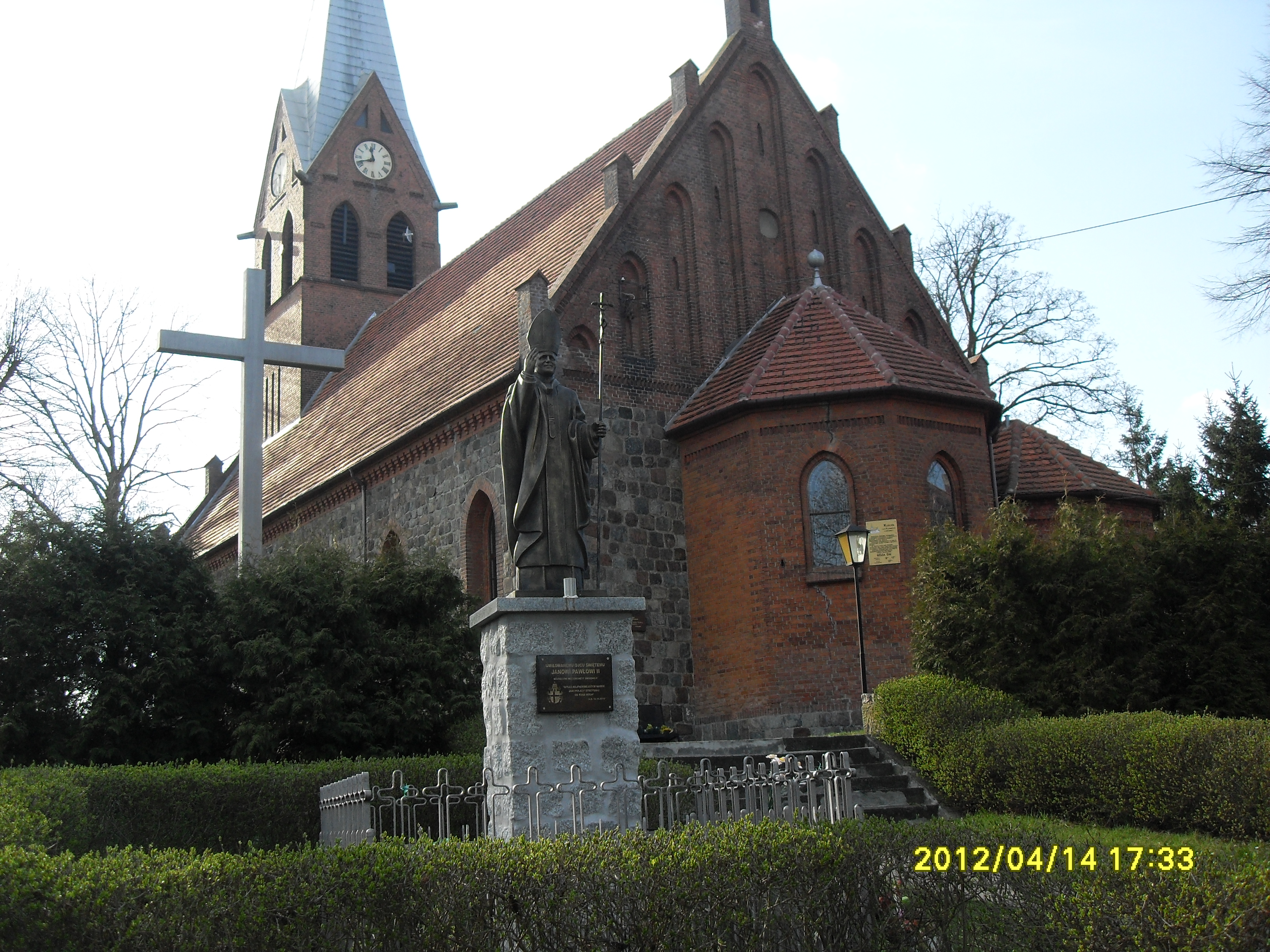 SWOBNICA-Kościół P.W.ŚW.KAZIMIERZA.